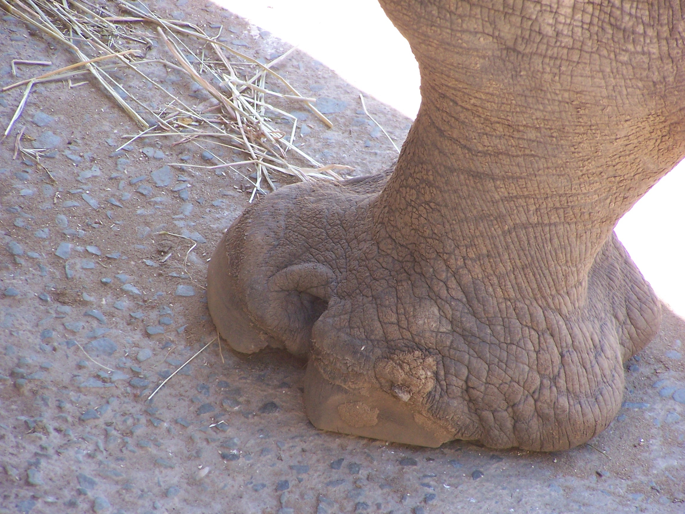 Photographie détaillée de la patte de Whi, un rhinocéros blanc (Ceratotherium simum) mâle du Zoo de la Palmyre. Le rhinocéros blanc est en fait de couleur grise, mais un peu plus claire que celle des rhinocéros noirs (Diceros bicornis). Sa longueur peut aller jusqu'à 4 m (hors queue), sa hauteur au garrot est d'environ 1,80 m et son poids va de 1 400 jusqu'à 3 500 kg, ce qui en fait la plus grande de toutes les espèces de rhinocéros. L'odorat est chez lui le sens le plus important ; les oreilles et yeux jouent au contraire un rôle secondaire. Herbivores, les rhinocéros blancs se rencontrent principalement dans les savanes africaines, où ils sont généralement actifs et crépuscule et dorment dans la journée. Très abondants il y a encore quelques décennies à peine, sont aujourd'hui menacés d'extinction, non seulement en raison de la destruction de leur habitat, mais surtout du braconnage pour leurs cornes, qui bien que n'étant constituées que de simple kératine, comme les ongles et les cheveux, sont très convoitées par la médecine traditionnelle chinoise ou pour la fabrication de manches de poignards au Yémen. La population mondiale est ainsi passée de plus de 2 millions d'individus au début du XIXème siècle, à 18 000 environ aujourd'hui, toutes espèces confondues. Le rhinocéros blanc, qui a ainsi failli disparaître il y a moins d'un siècle (il en restait moins de 50 individus), est désormais le seul à être encore présent en nombre raisonnable avec 14 540 individus. L'une de ses sous-espèce n'est cependant plus représentée que par 4 individus vivant dans leur dernier refuge, le Parc national de la Garamba, en République démocratique du Congo.